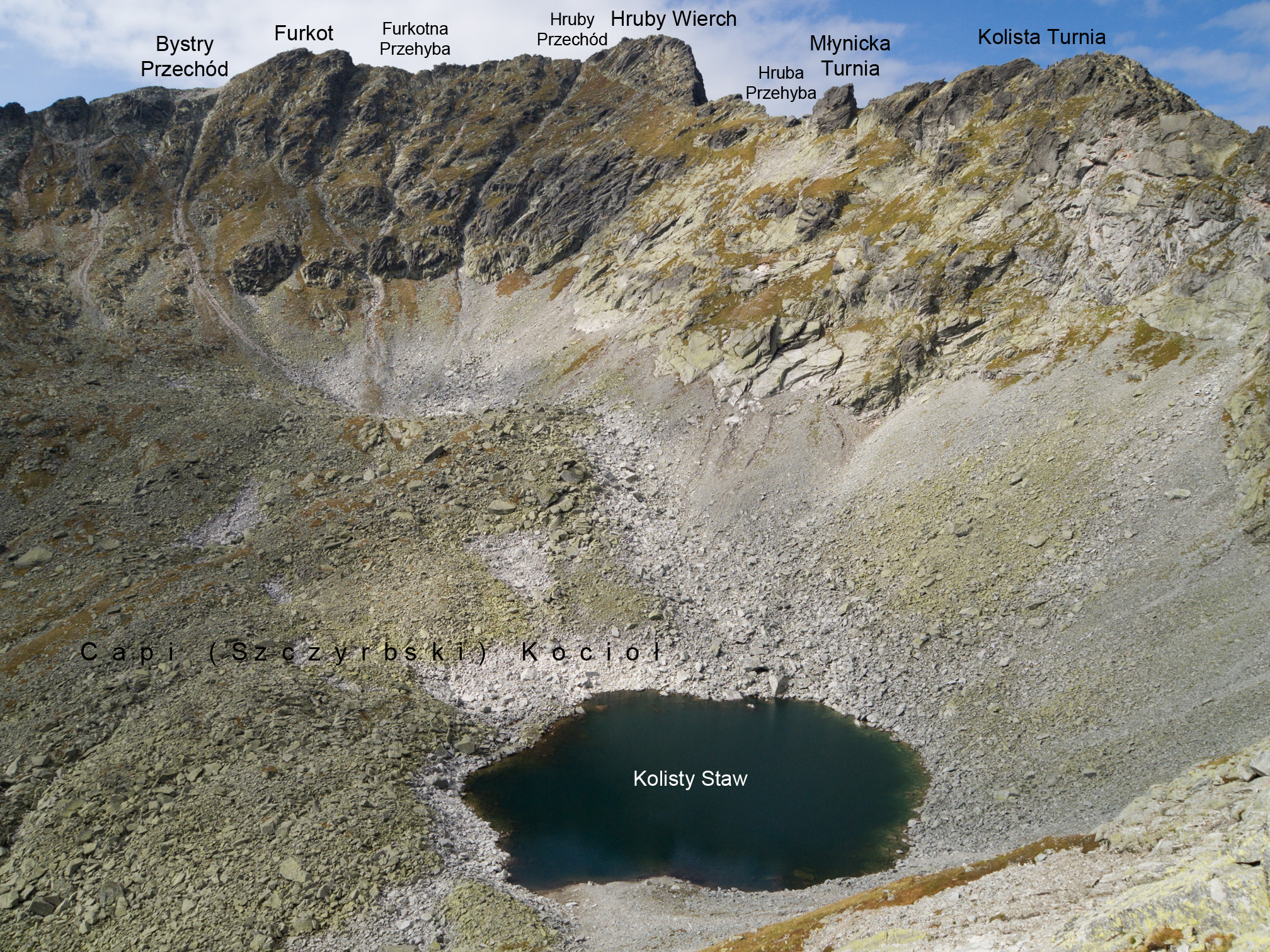 Furkot, Hruby Wierch, Młynicka Turnia i Kolista Turnia, w dole Kolisty Staw. Polskie podpisy.